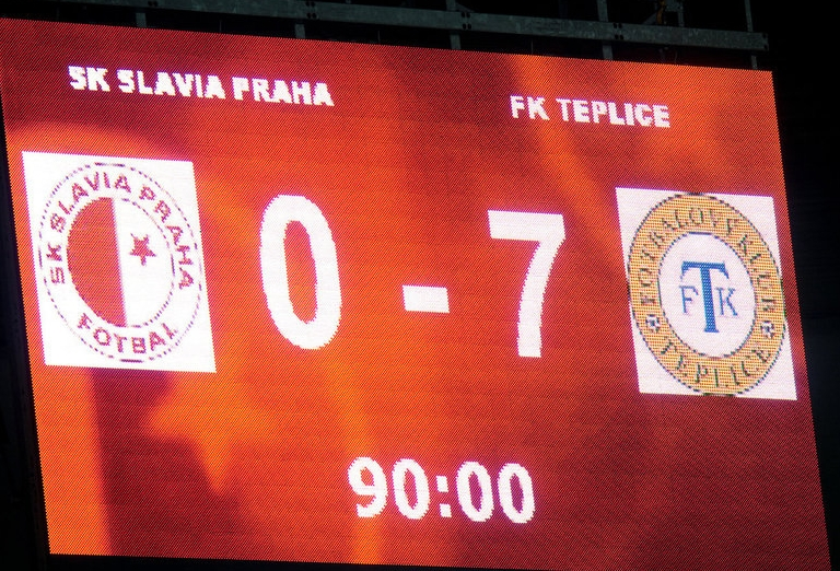 Slavia - Teplice 19.08.2013